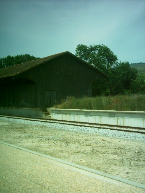 Estação ferroviária de Dois Portos